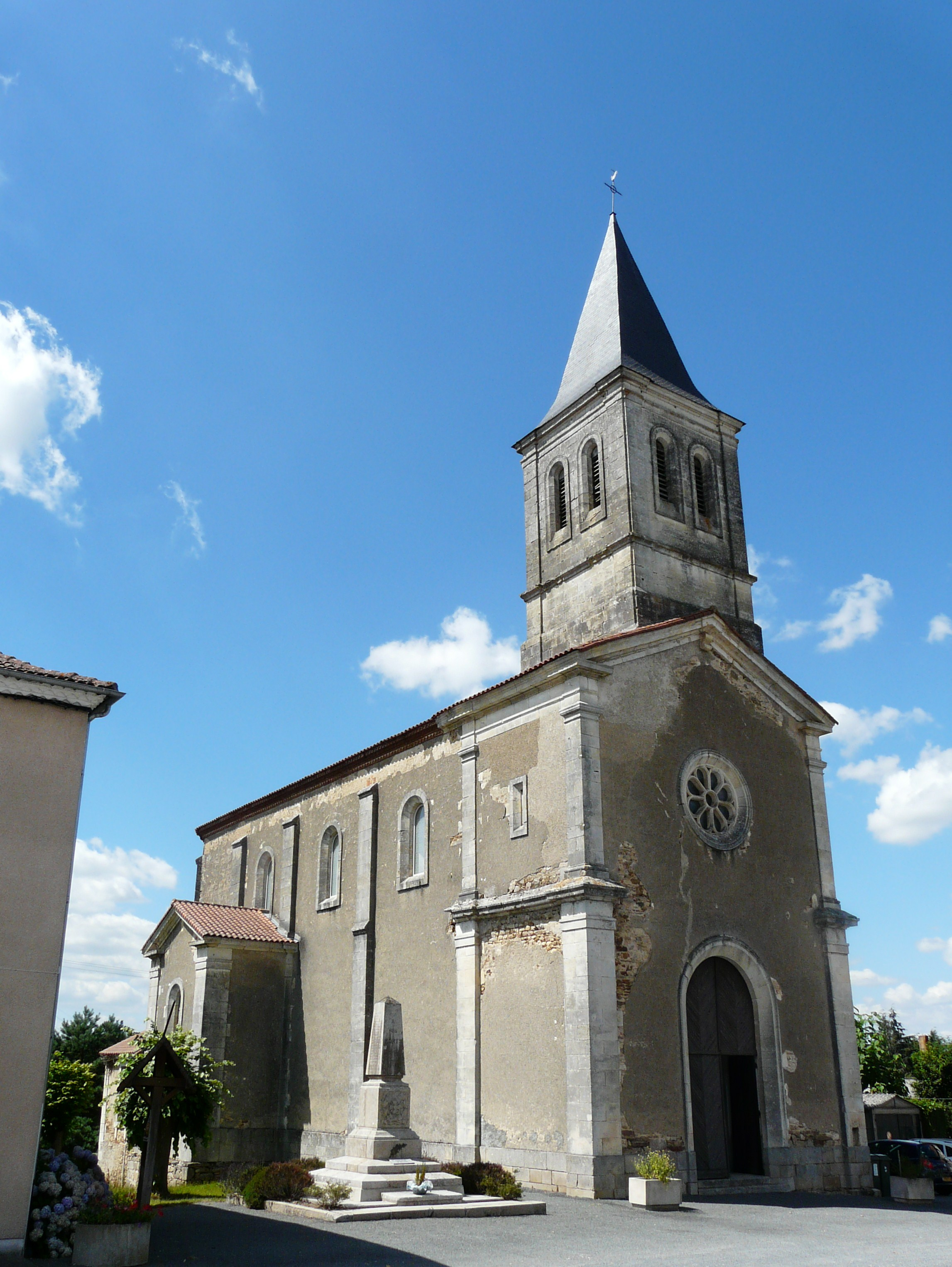 L'église Saint-Étienne vue du sud-est, Firbeix, Dordogne, France.